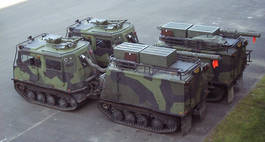 Sisu NA-110 (Sisu Nasu)